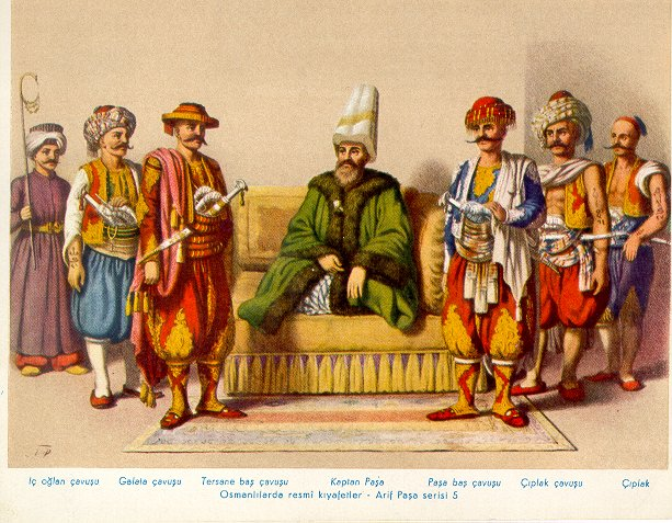 Arif Paşa tarafından çizilen ve Kaptan-ı Derya'yı tasvir eden bir resim İç Oğlan Çavuşu Acemi Ocağı Subayı Galata Çavuşu Galata Muhafızları Subayı Tersane Baş Çavuşu Tersane Muhafızları Subayı Kaptan Paşa Kaptan-i Derya Paşa Baş Çavuşu Çıplak Çavuş Çıplaklar Subayı Çıplak Kaptanpaşa Maiyeti